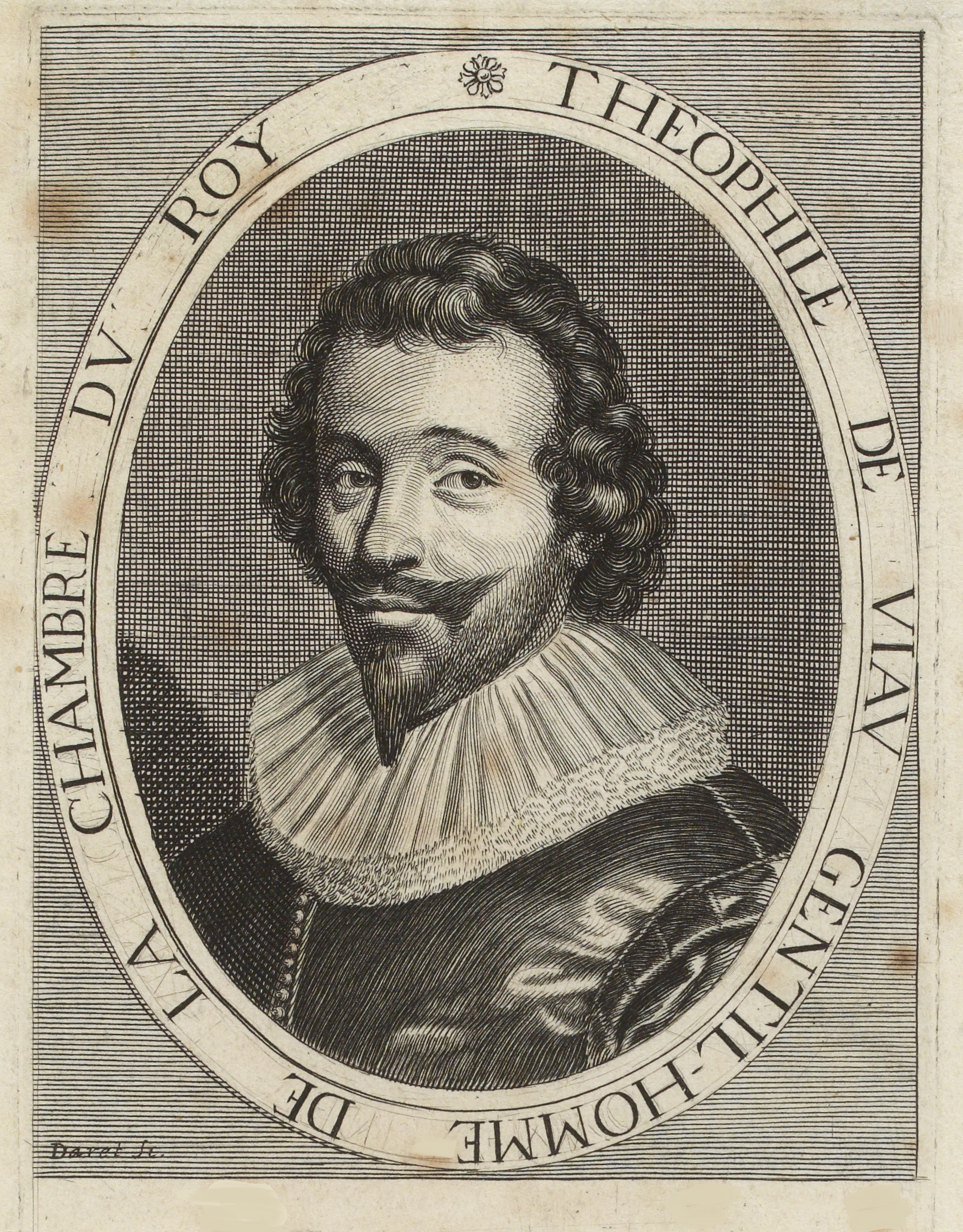 Pierre Daret, portrait gravé de Théophile de Viau, édition des Œuvres complètes de 1632.